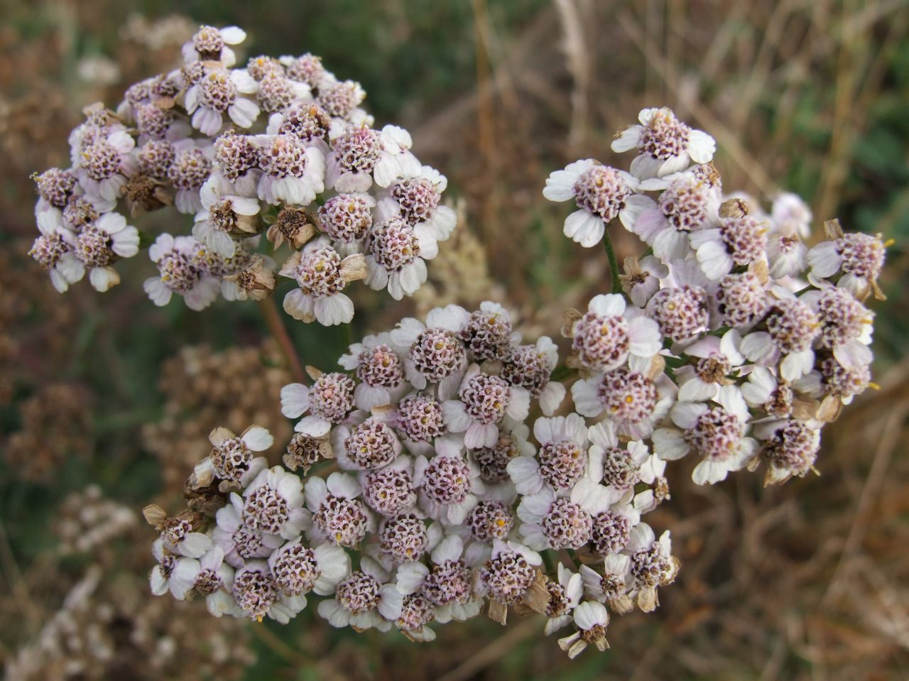 Achillea nobilis (habitat:Gorce)